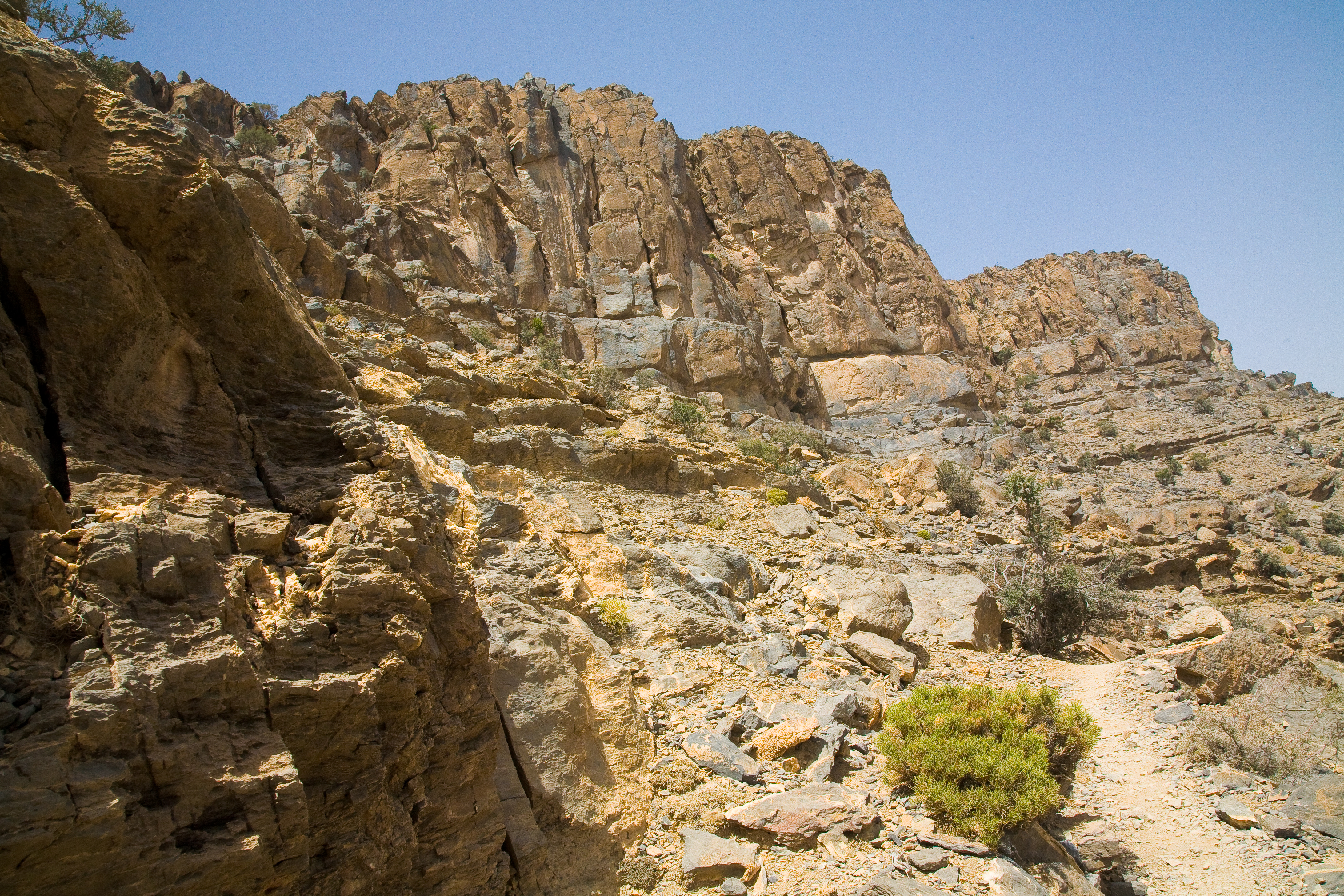 Jebel Shams